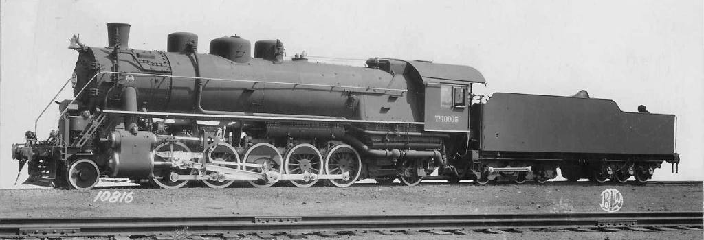 Паровоз Тб постройки завода Балдвин